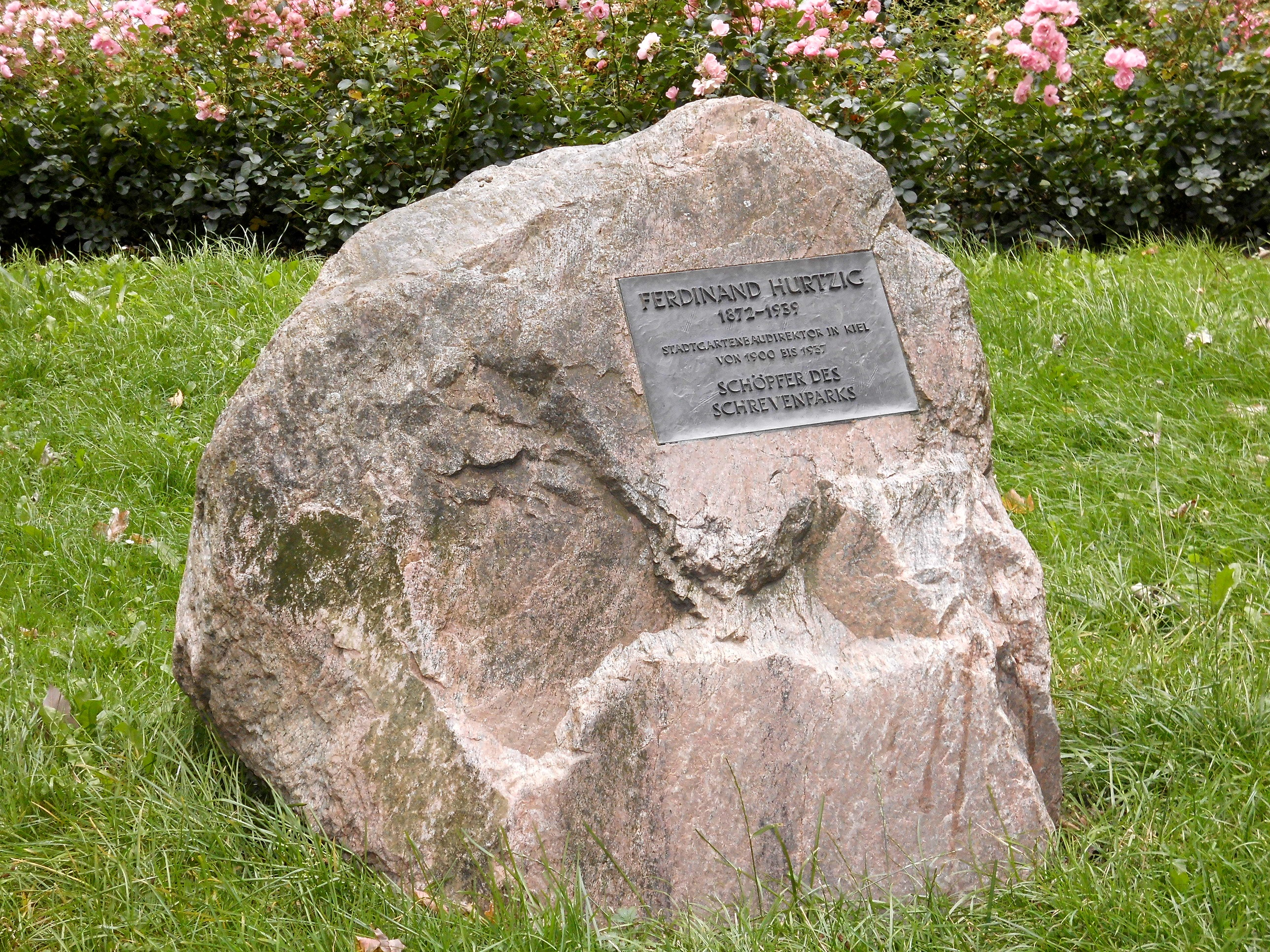 Gedenkstein im Schrevenpark im Kieler Stadtteil Schreventeich. Siehe auch Detailaufnahme.